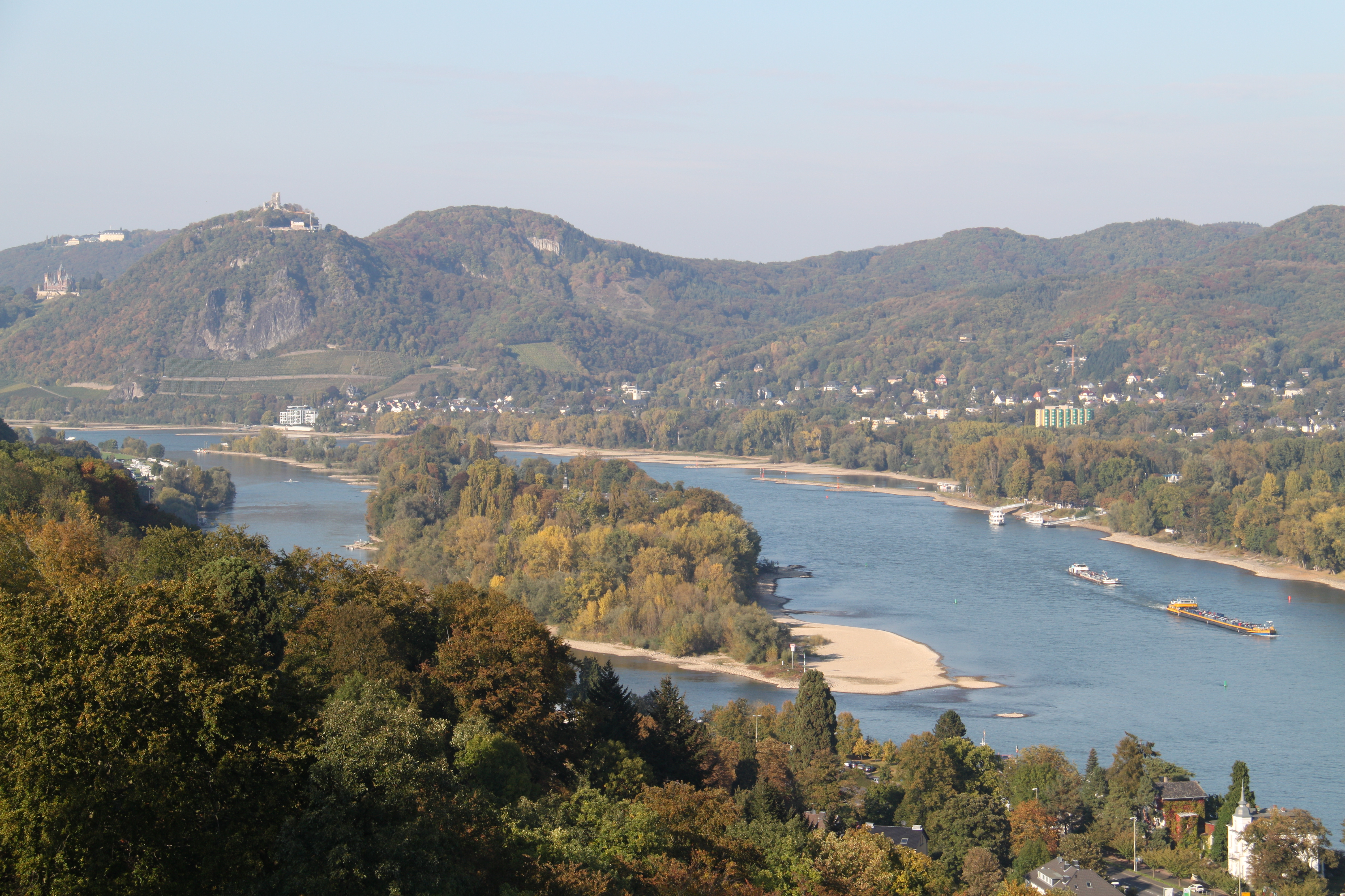 Blick vom Aussichtsturm des Wildpark Rolandseck über die Rheininsel Nonnenwerth Richtung Drachenfels